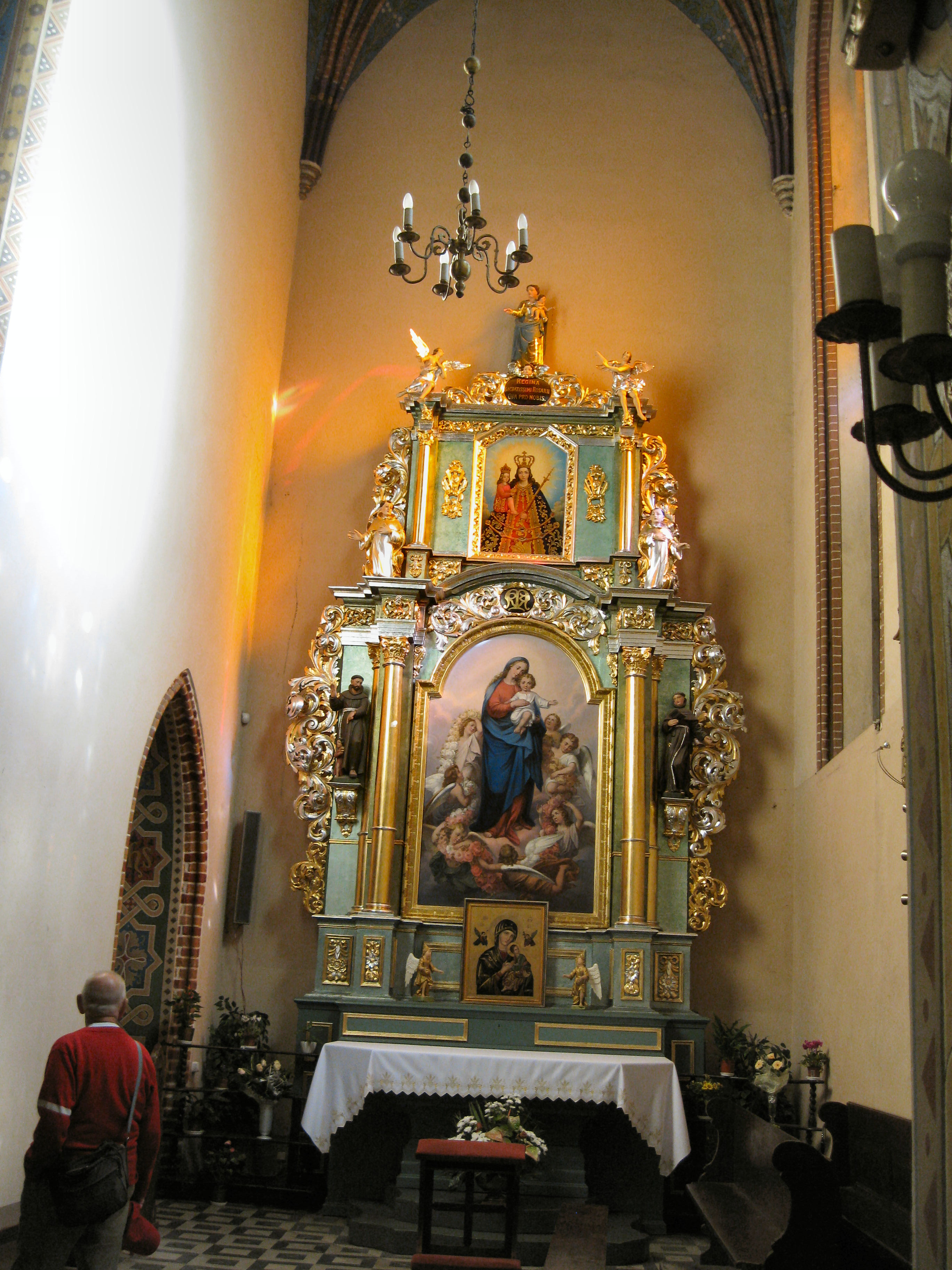 kościół parafialny p.w. Podwyższenia Krzyża Św. ul Kardynała Wyszyńskiego ( d.1 Maja 32) 6 Tczew, Tczew